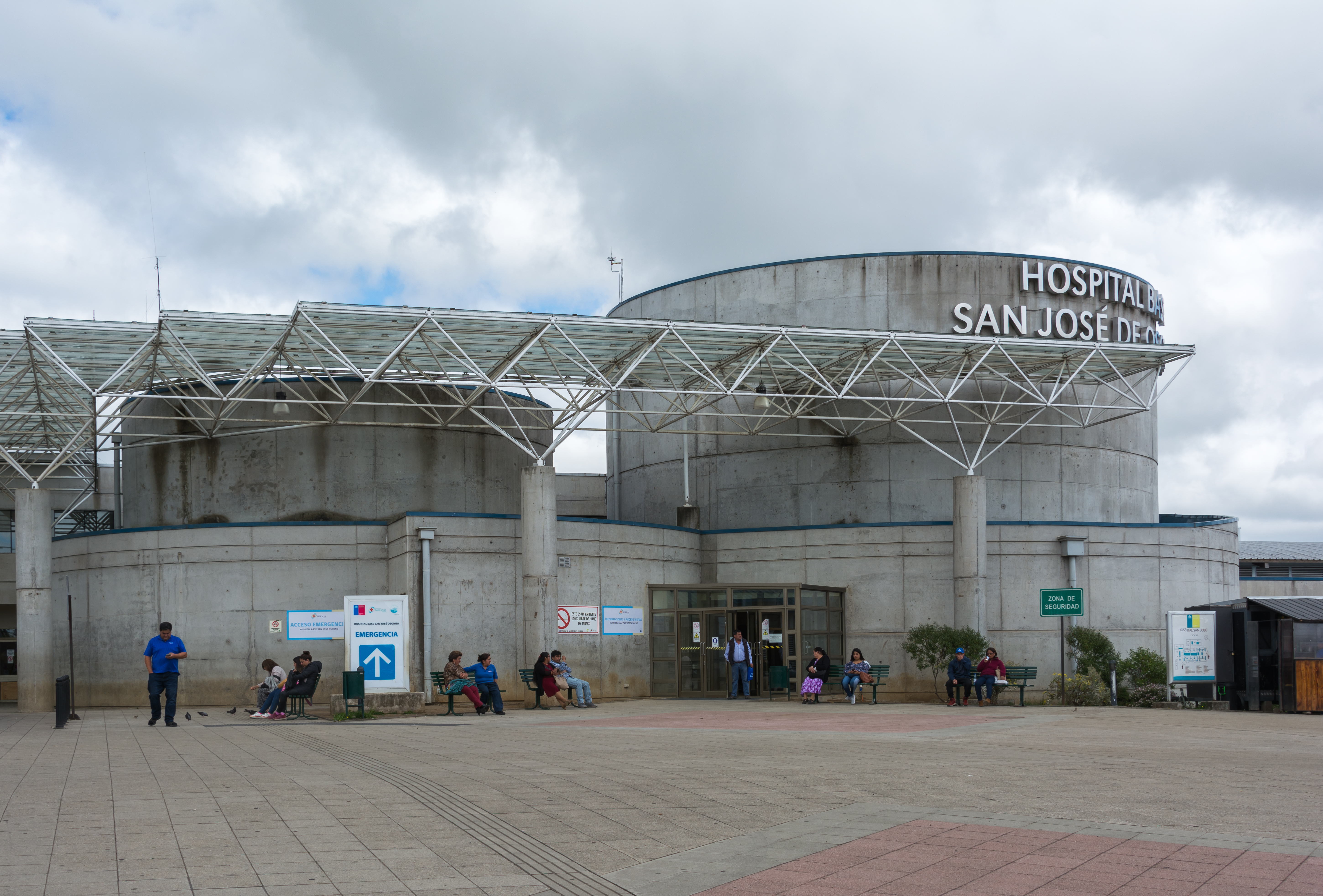 Hospital Base San José de Osorno, Osorno, Región de Los Lagos, Chile.